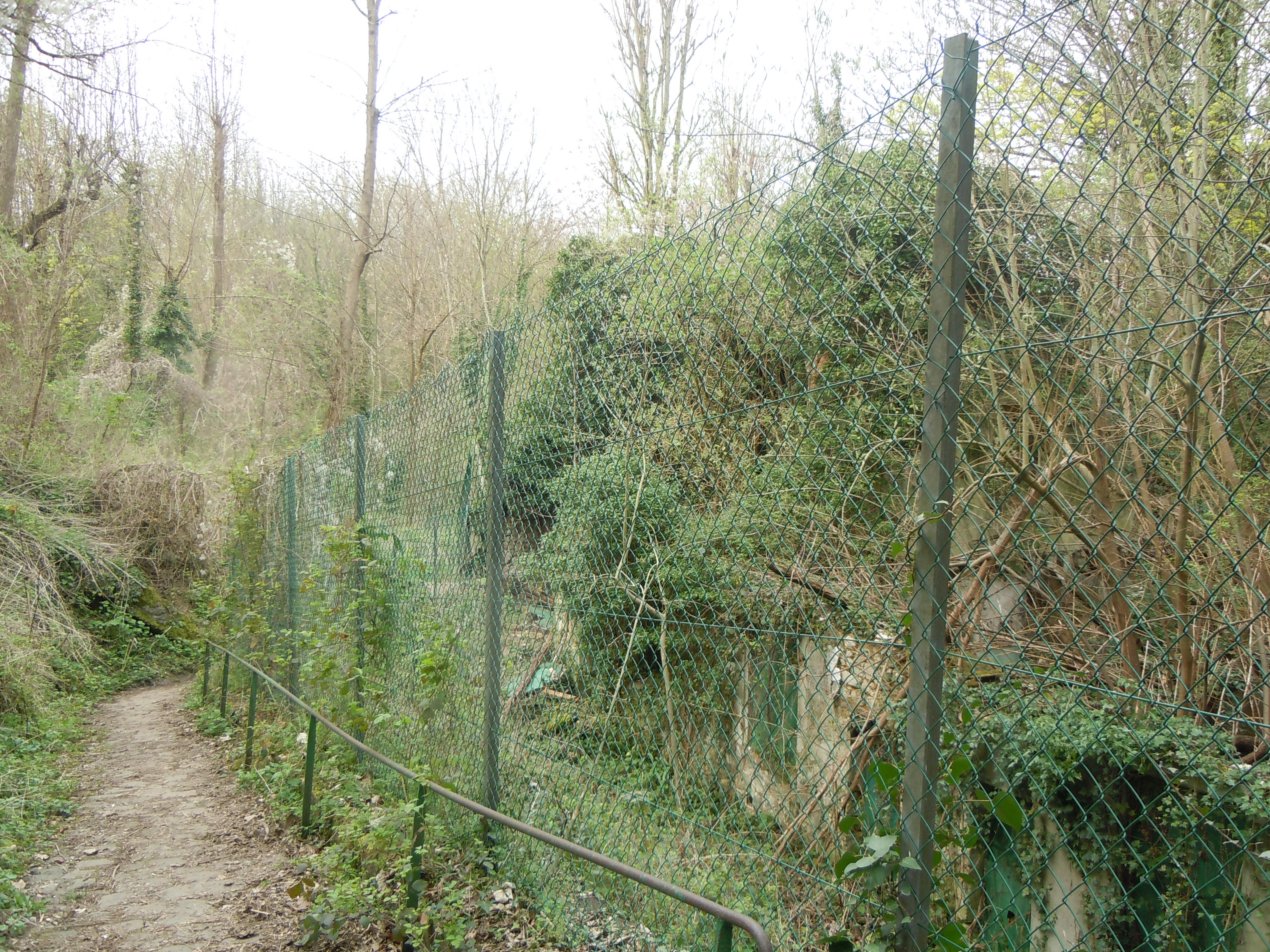 Vue actuelle des ruines de la ferme du Sentier de la Mi-Côte tableau d'Alfred Sisley (1873) Alfred Sisley (1873)